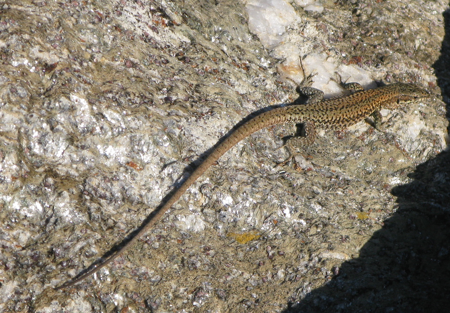 Lézard des murailles (podarcis muralis) à Port-Cros.